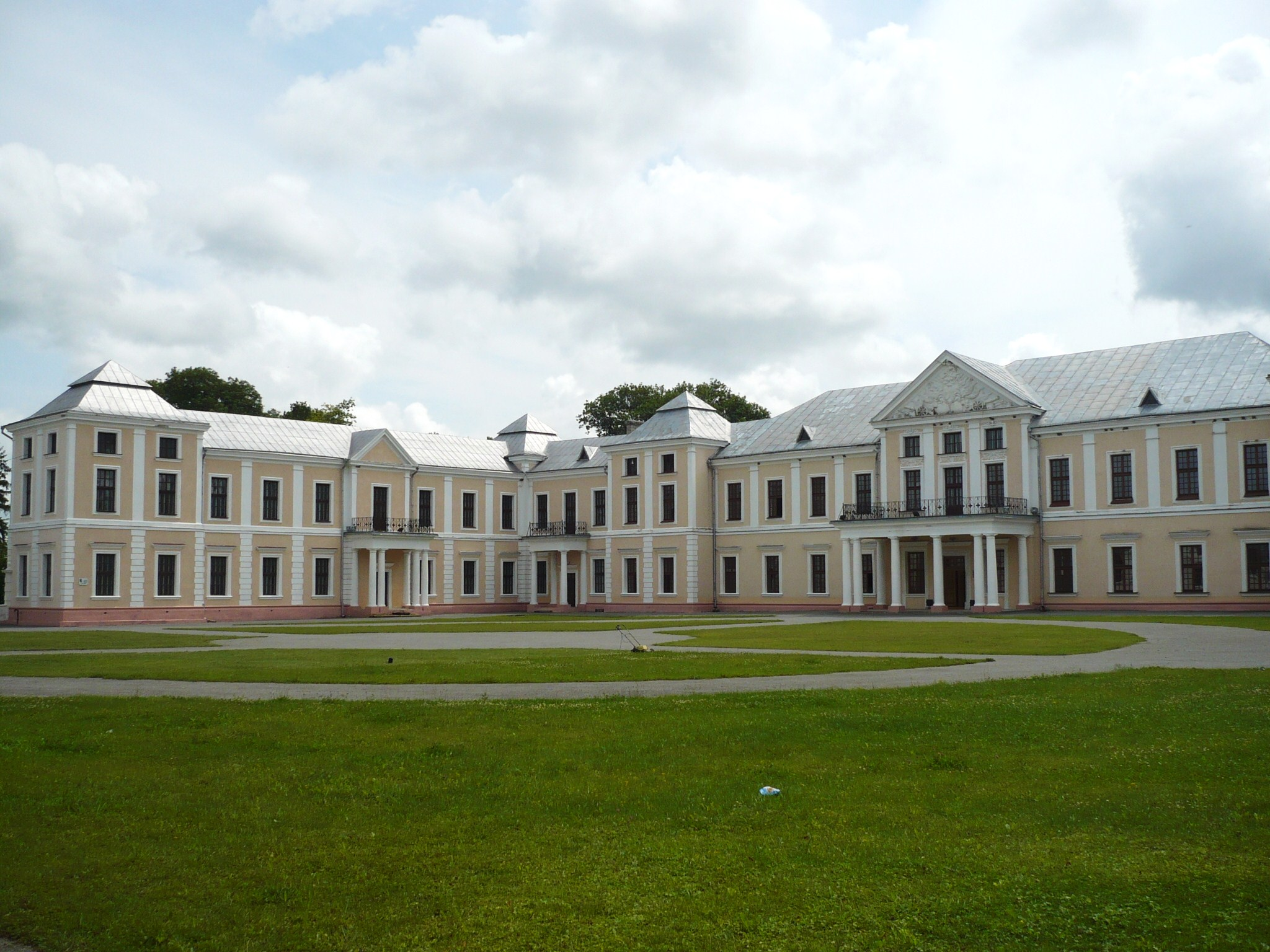 Wiśniowiec, pałac